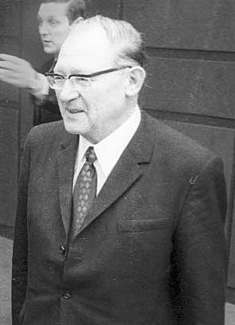 Eugen Kogon (Leitthema "Autorität und Freiheit". Eröffnung. Im der Christian-Albrechts-Universität (CAU) der Historiker Prof. Dr. Eugen Kogon, der die Eröffnungsrede zur "Rolle der Sozialwissenschaften in der Industriegesellschaft" hält.